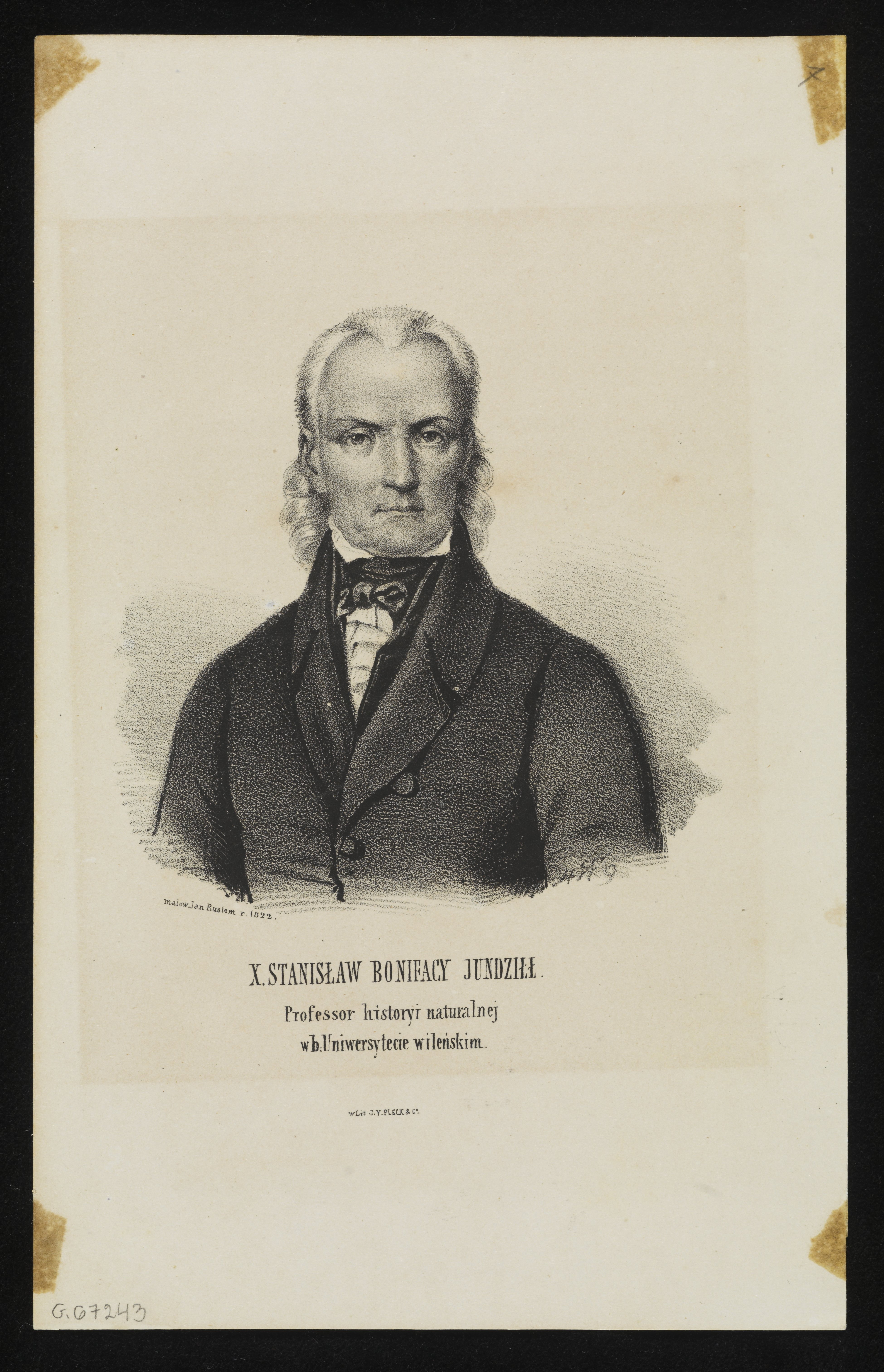 Беларуская (тарашкевіца): Партрэт Станіслава Юндзіла (Stanisłaŭ Jundził)